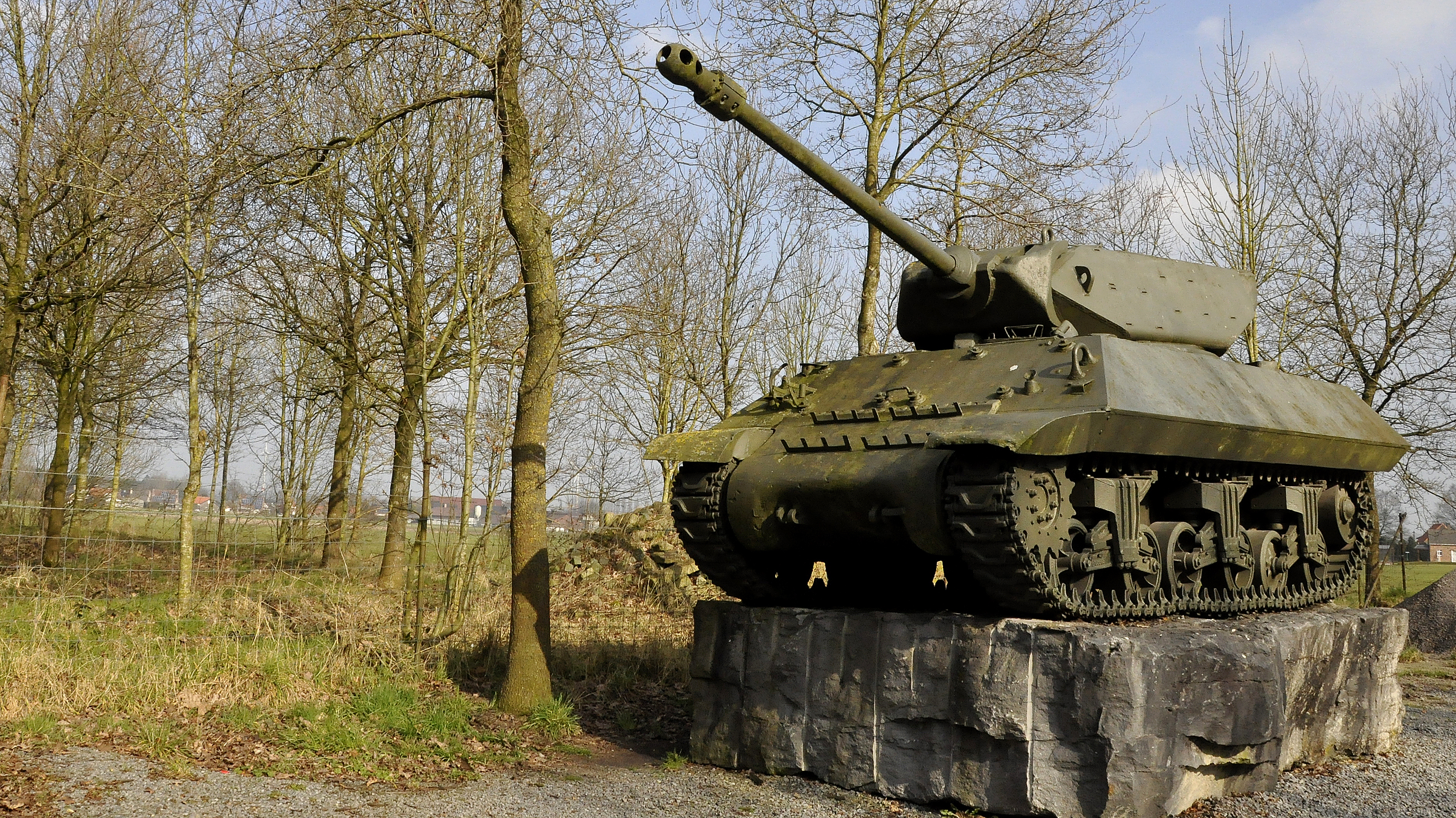 M10 Wolverine Adegem - Canada-Poland War II Museum 19-2-2015